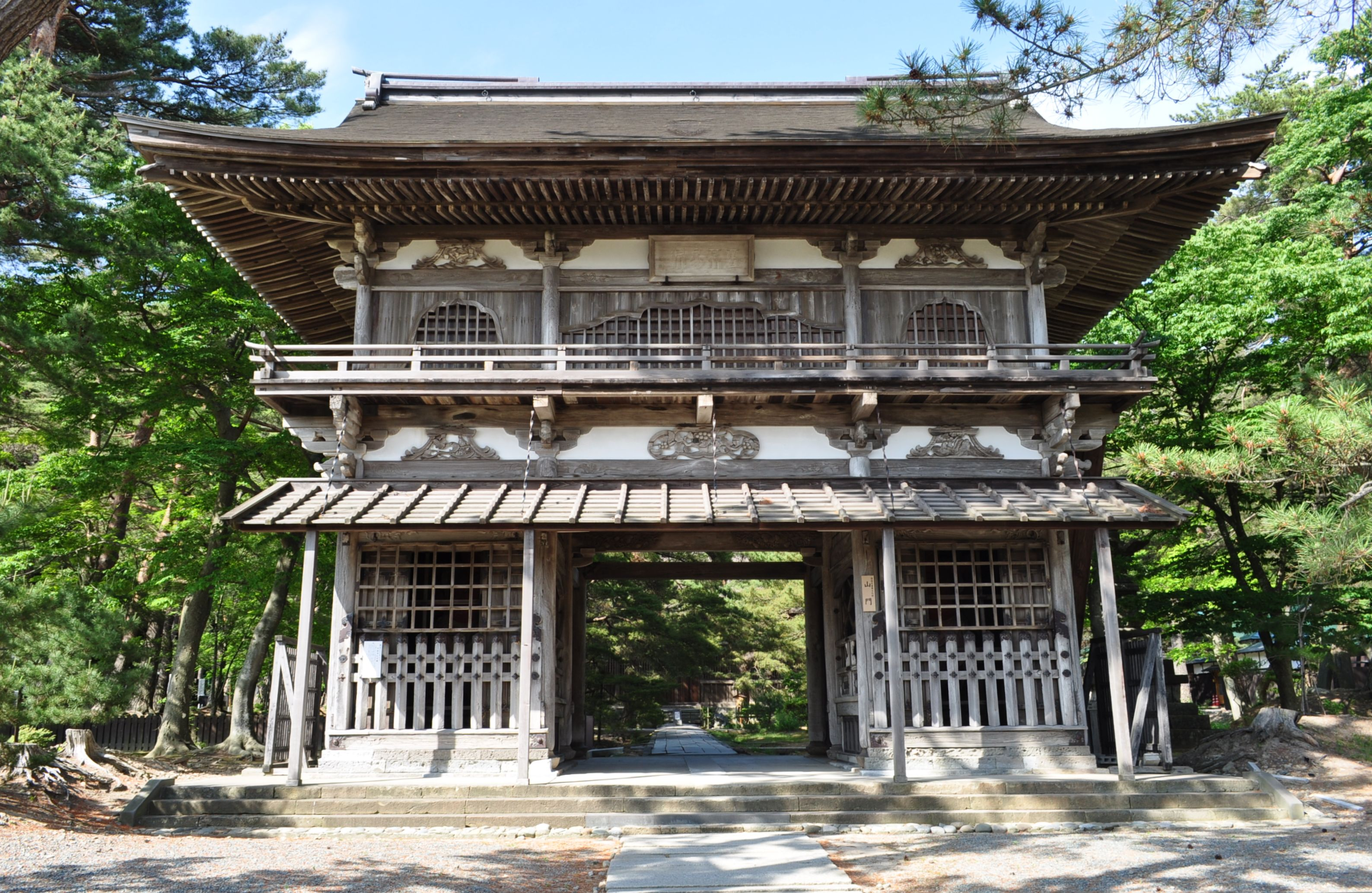 樋口家の菩提寺である天徳寺の山門